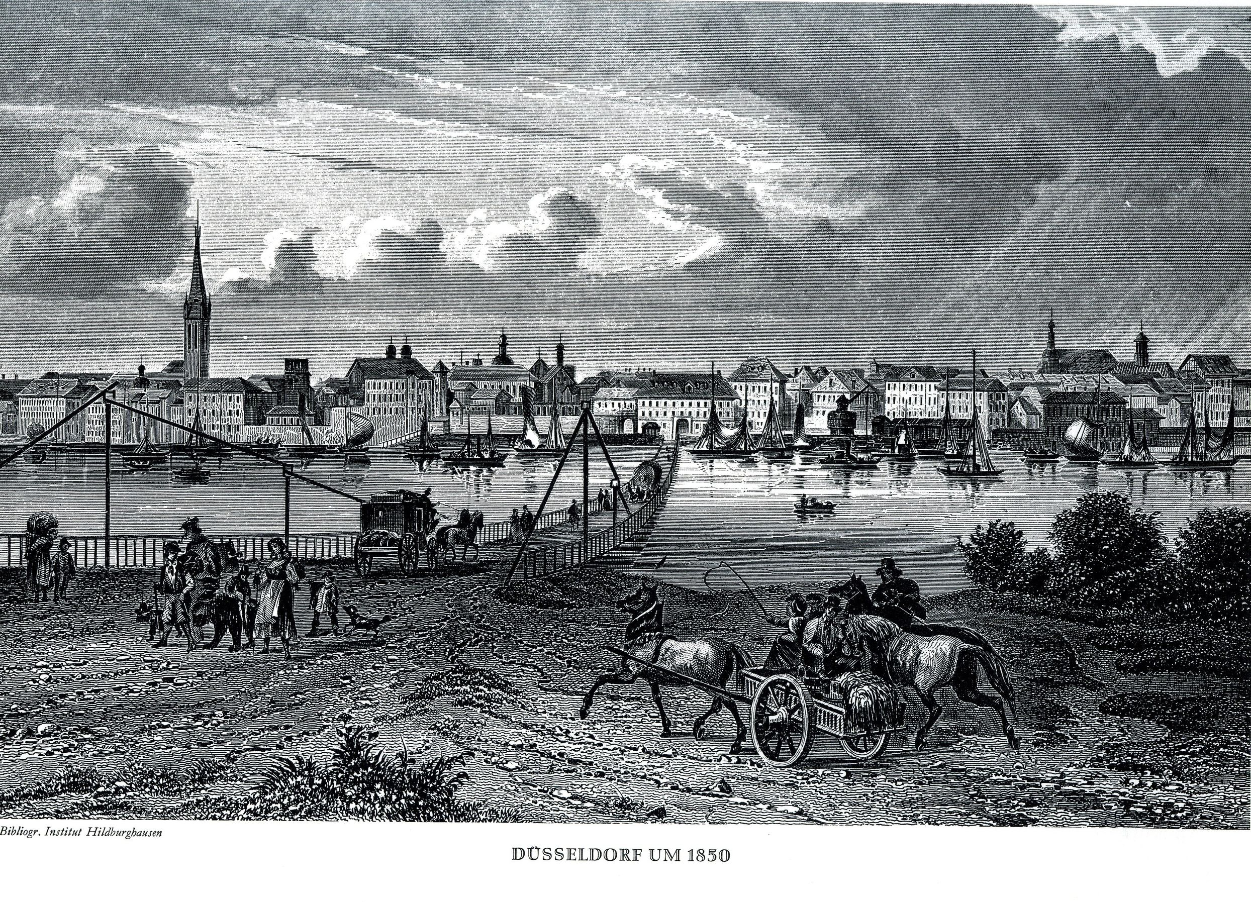 Düsseldorf, Stich um 1850, Blick von der Oberkasseler Rheinstation auf die Düsseldorfer Altstadt, um 1850